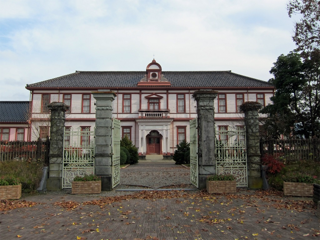 富山県立南砺福野高等学校